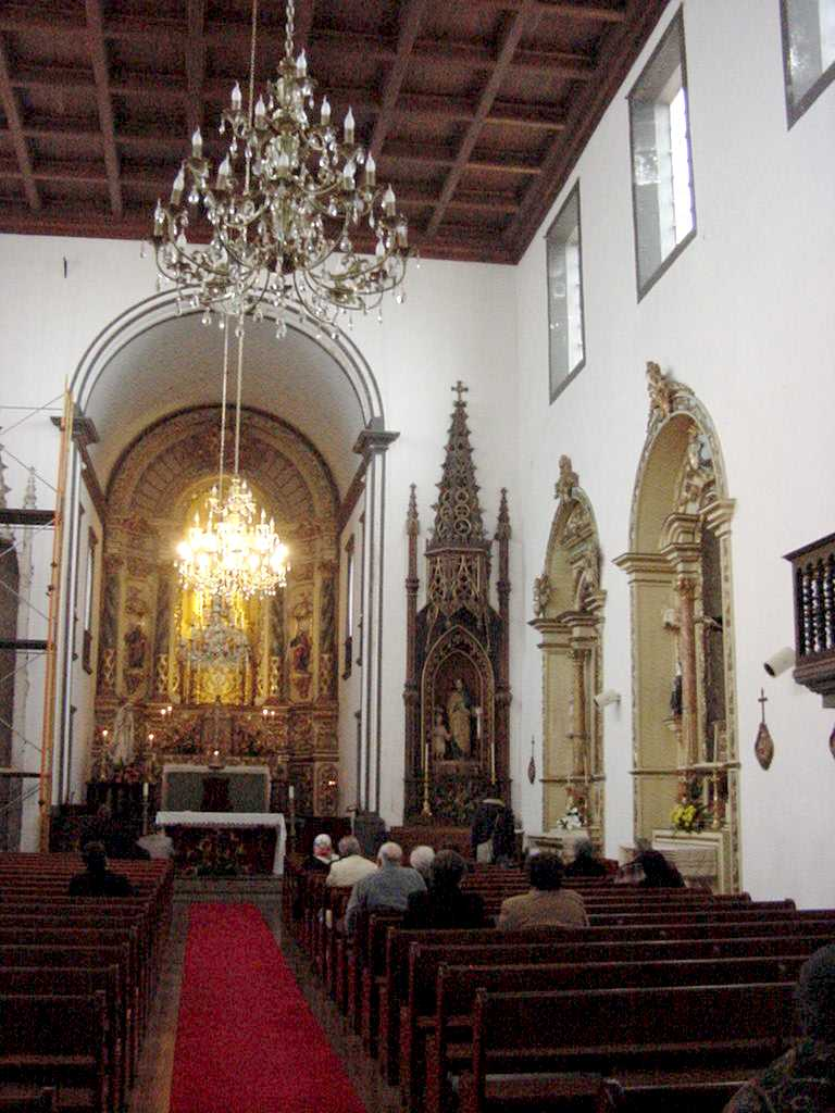 Igreja de São Pedro da Ribeirinha, nave, Angra do Heroísmo, Terceira, Açores